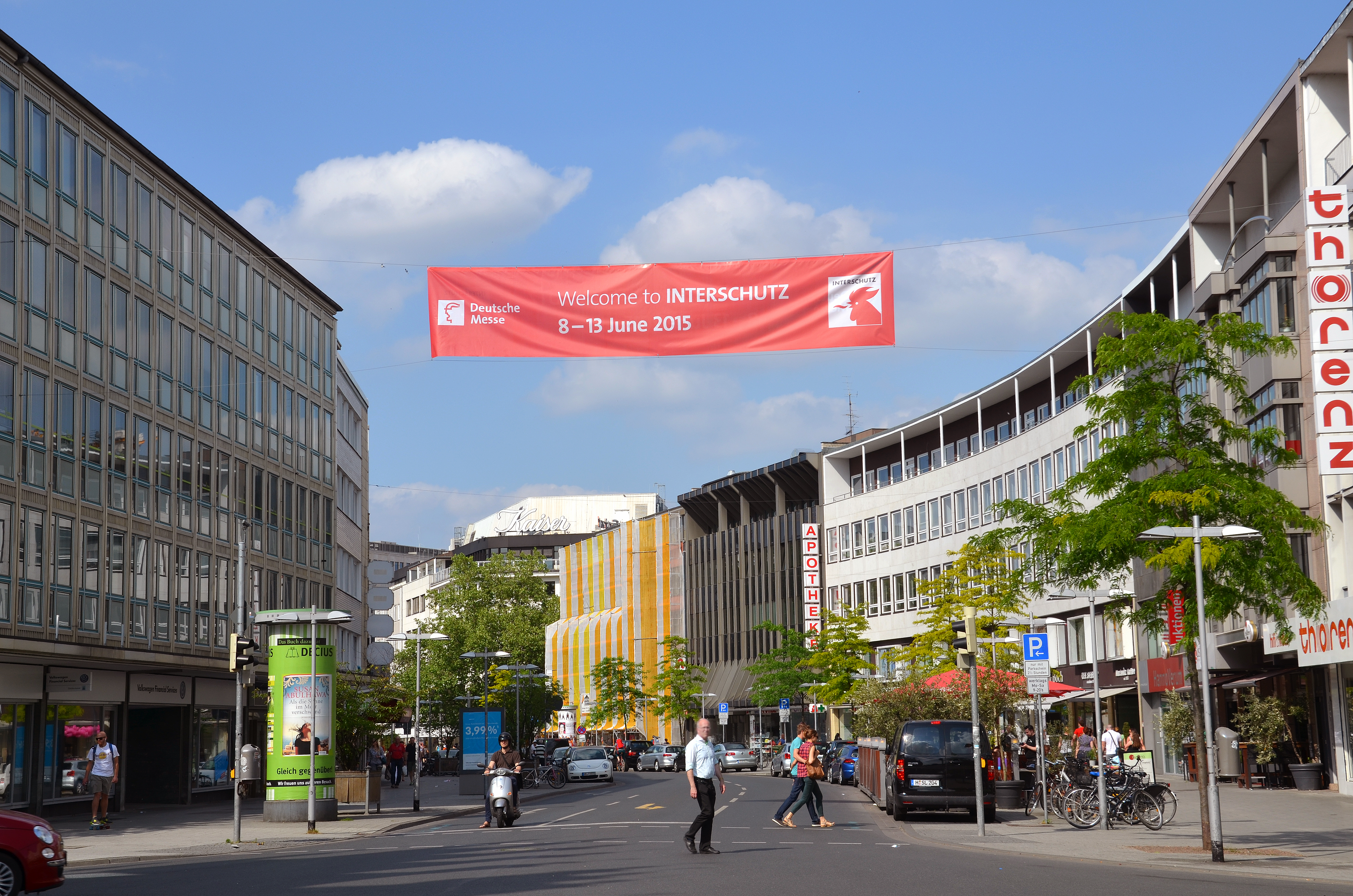 Englischsprachiges Transparent über der Karmarschstraße in Hannover mit der Aufschrift „Welcome to Interschutz June 8-13 2015“ ...